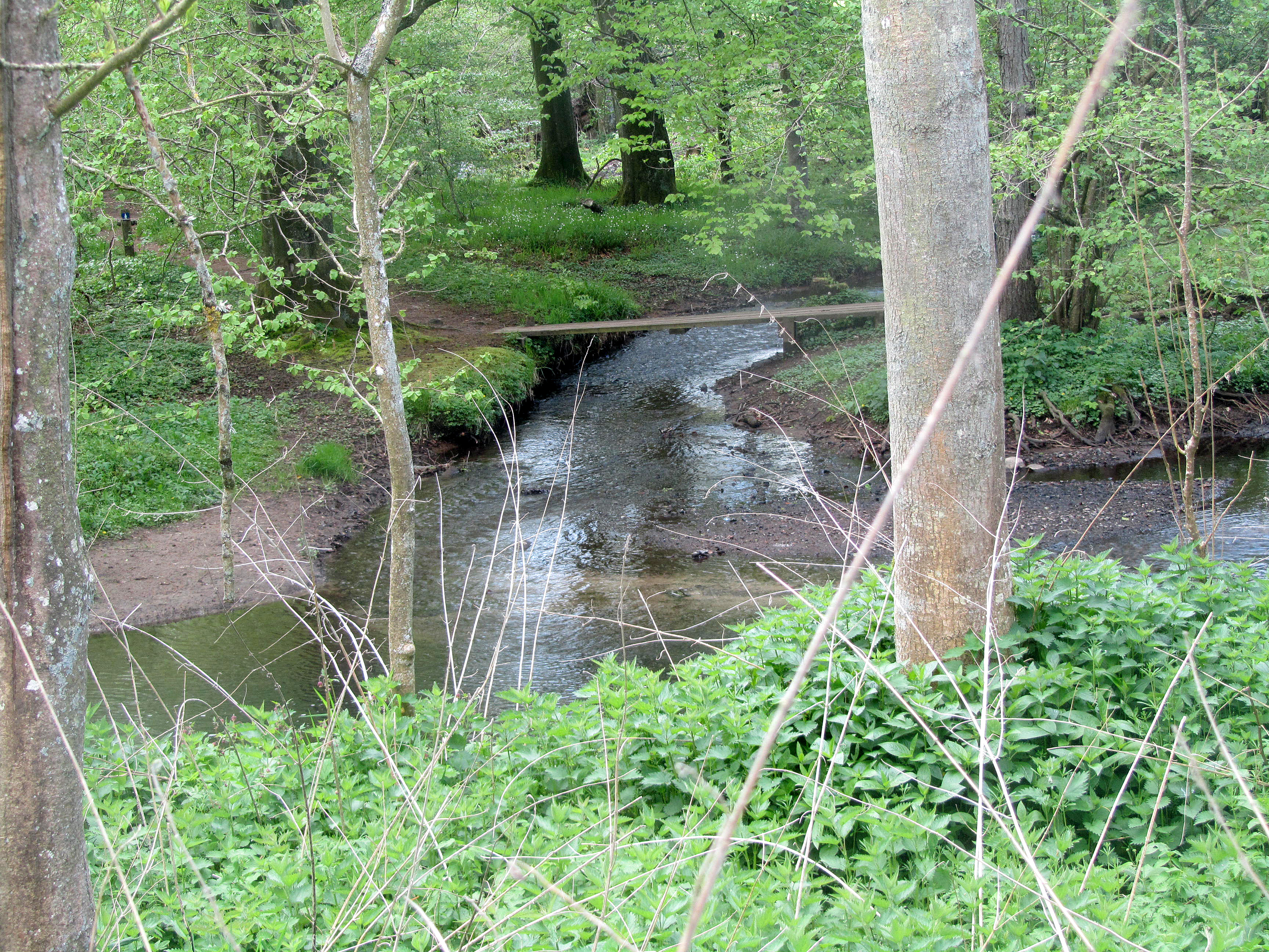 Jeksen Bæks udløb i Aarhus Å ved Fusvad Bro